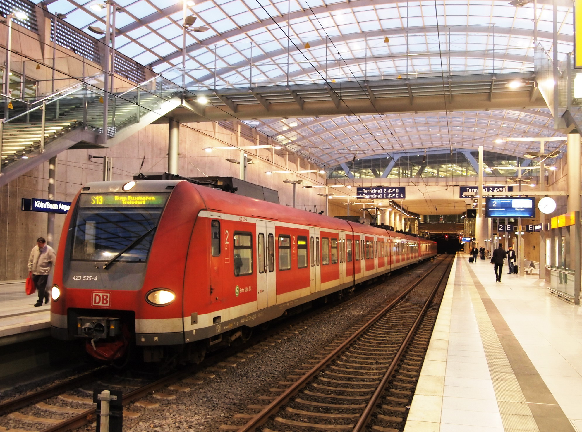 Flughafenbahnhof Köln-Bonn mit der S-Bahn S13 zur Kölner Innenstadt